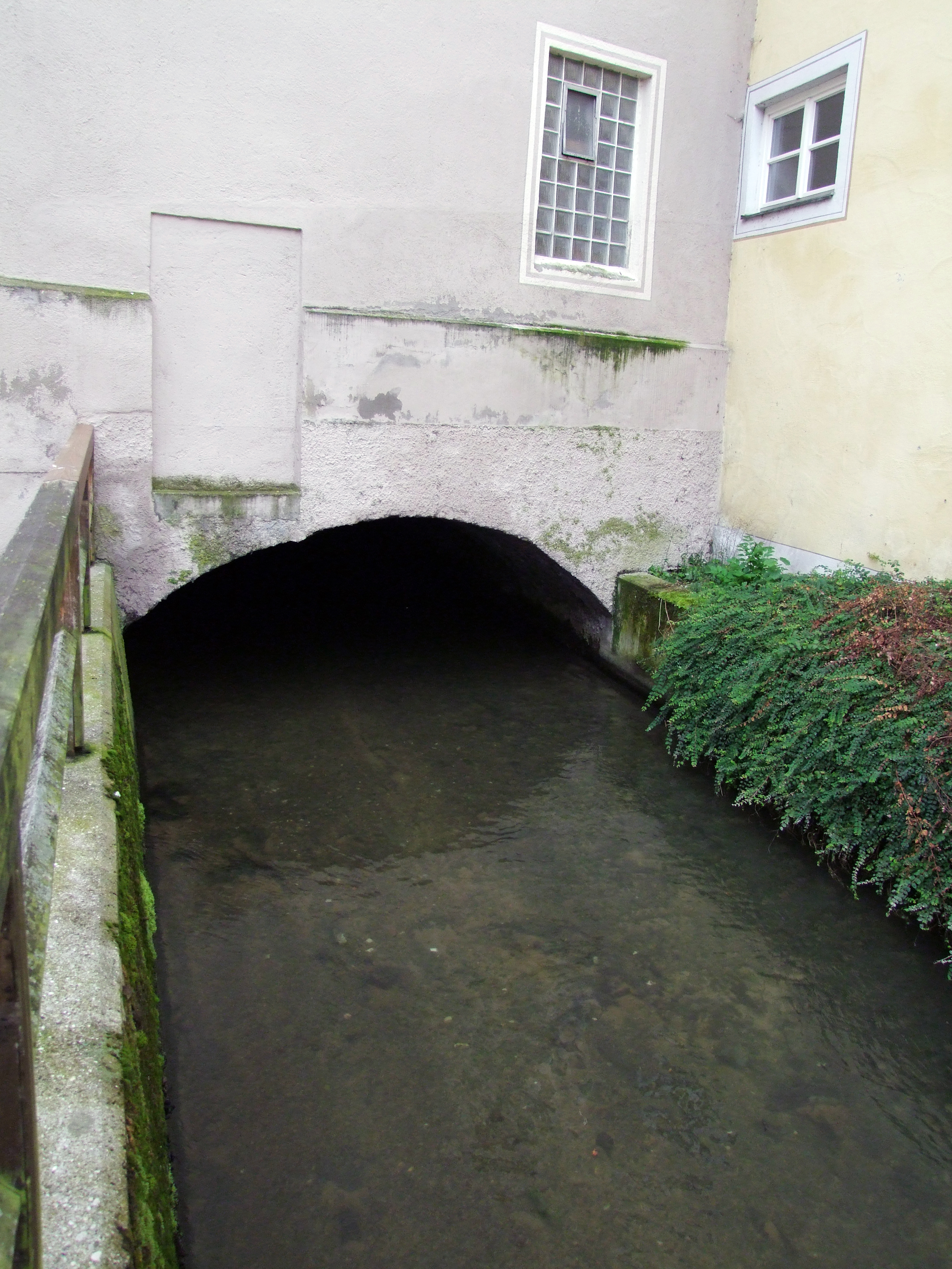 Mariä Verkündigung im oberschwäbischen Mindelheim. Ehemalige Augustiner, dann Jesuitenklosterkirche.